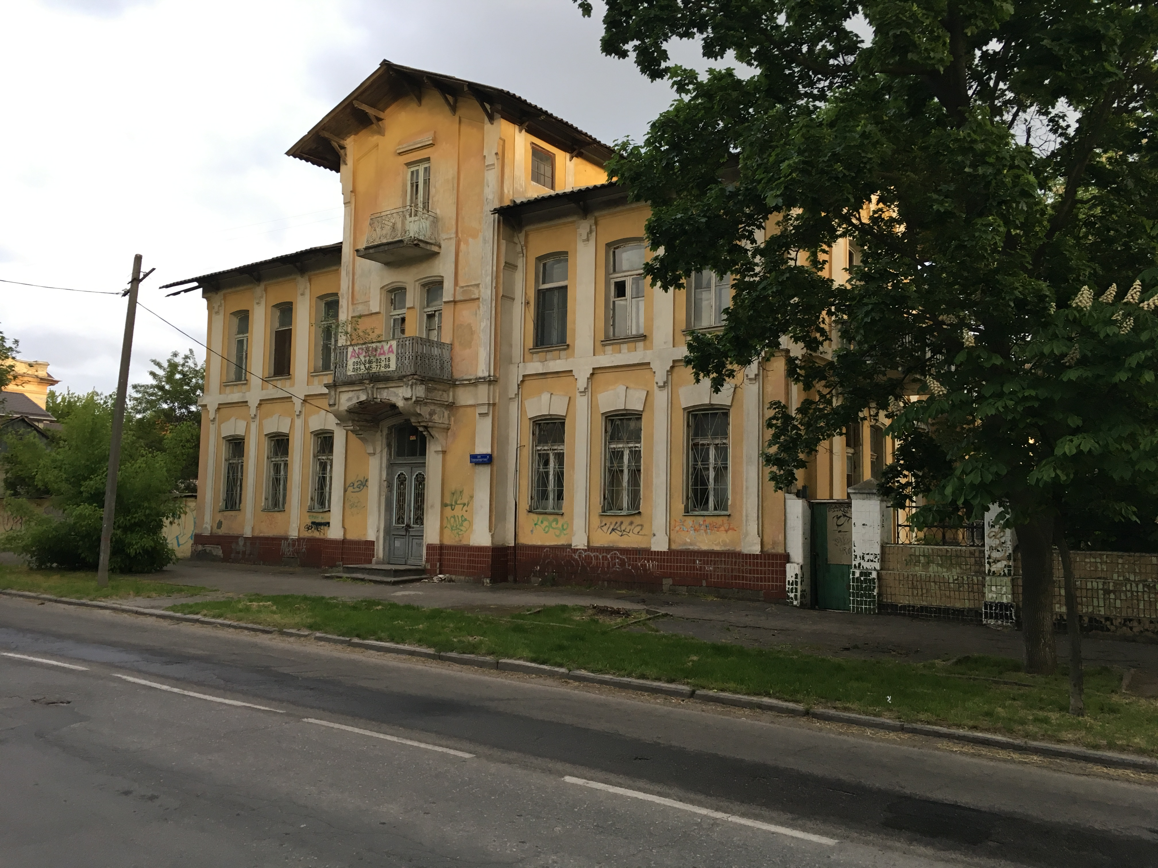 Pysareva